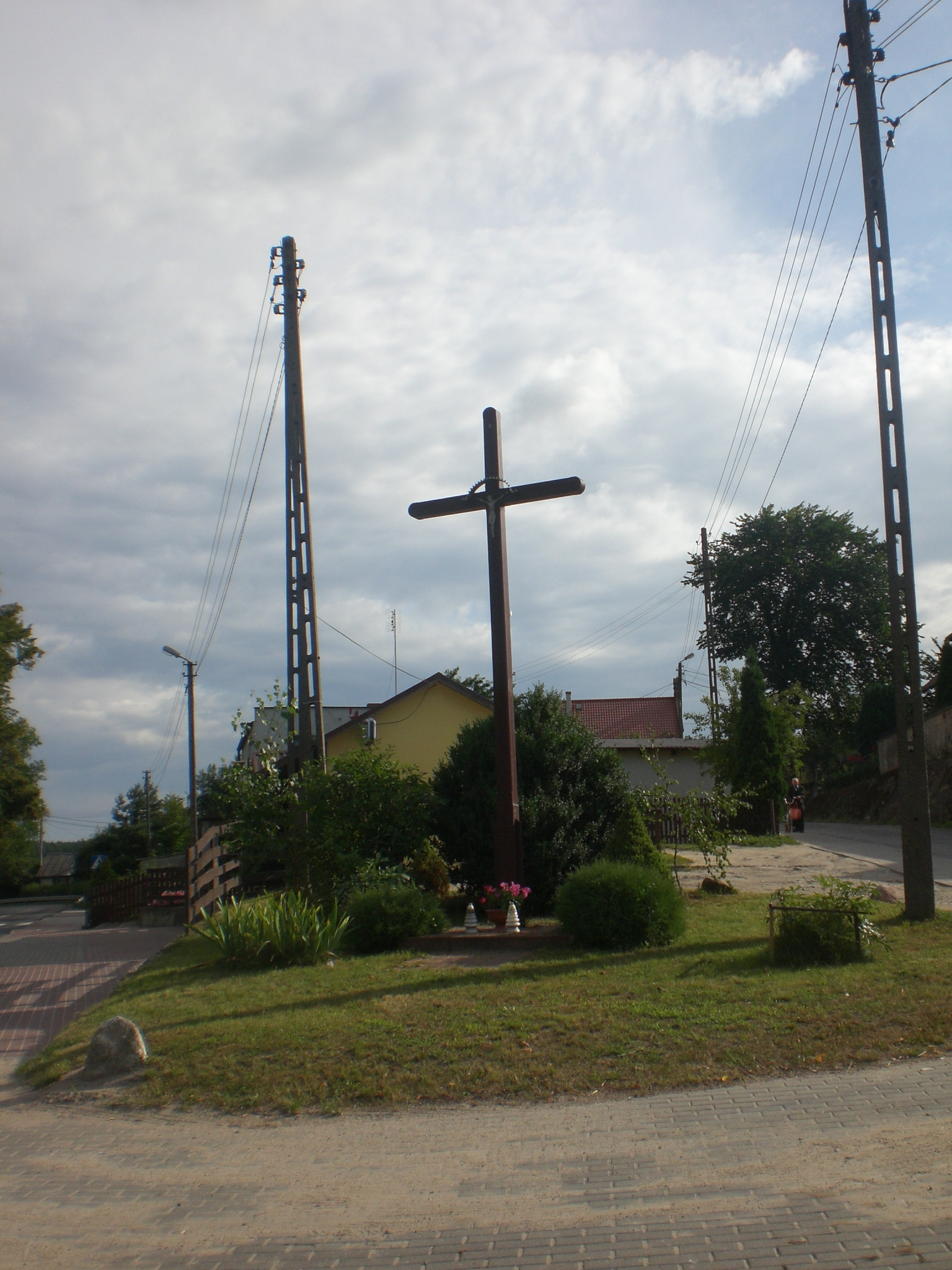 Linowiec